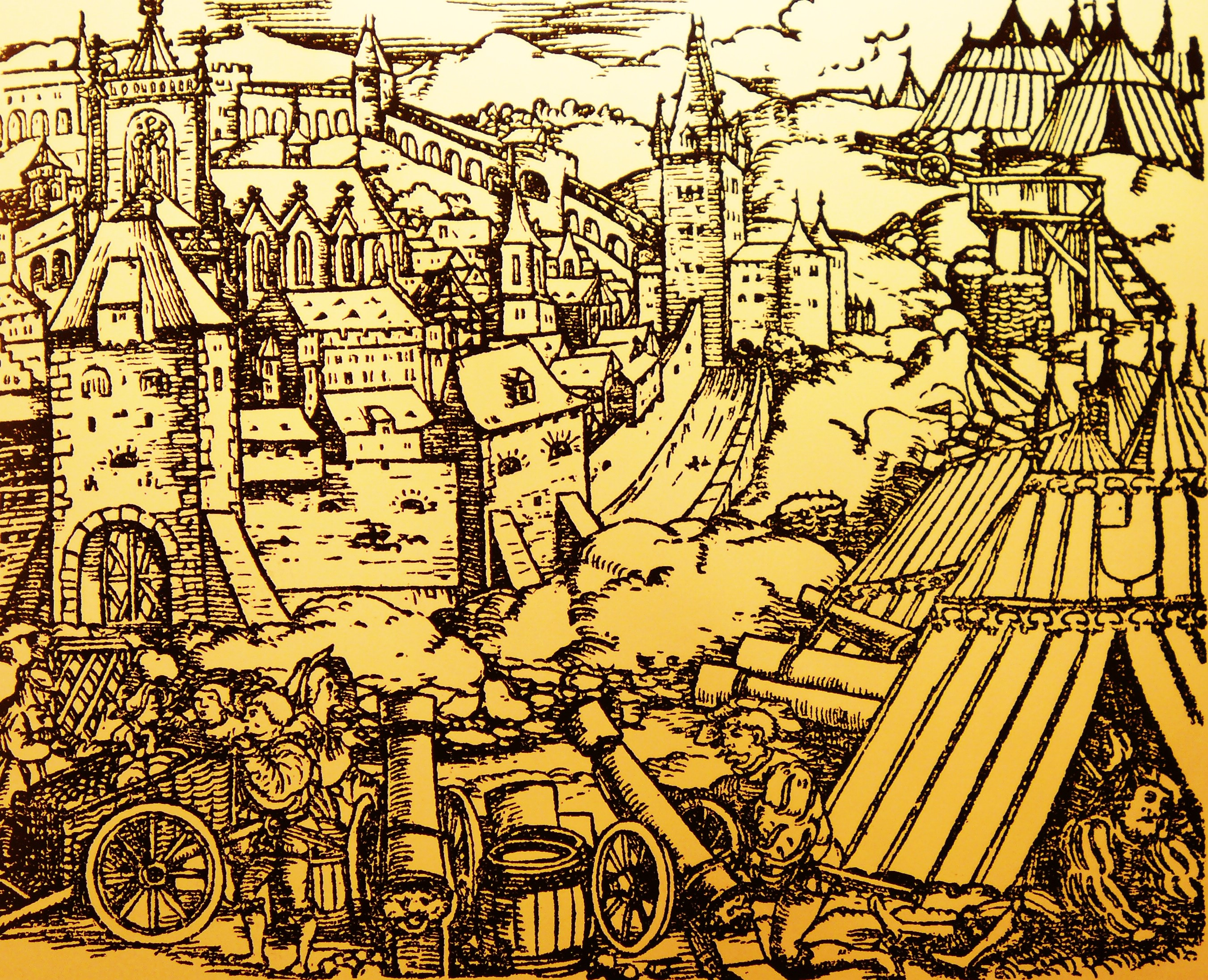 Belagerung der Stadt St. Wendel durch Franz von Sickingen im Jahr 1522; Conrad Faber von Creuznach, aus Titus Livius, Mainz 1523